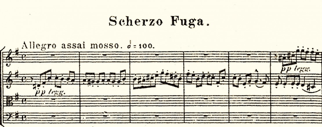 Scherzo Fuga dal Quartetto in mi minore di Giuseppe Verdi